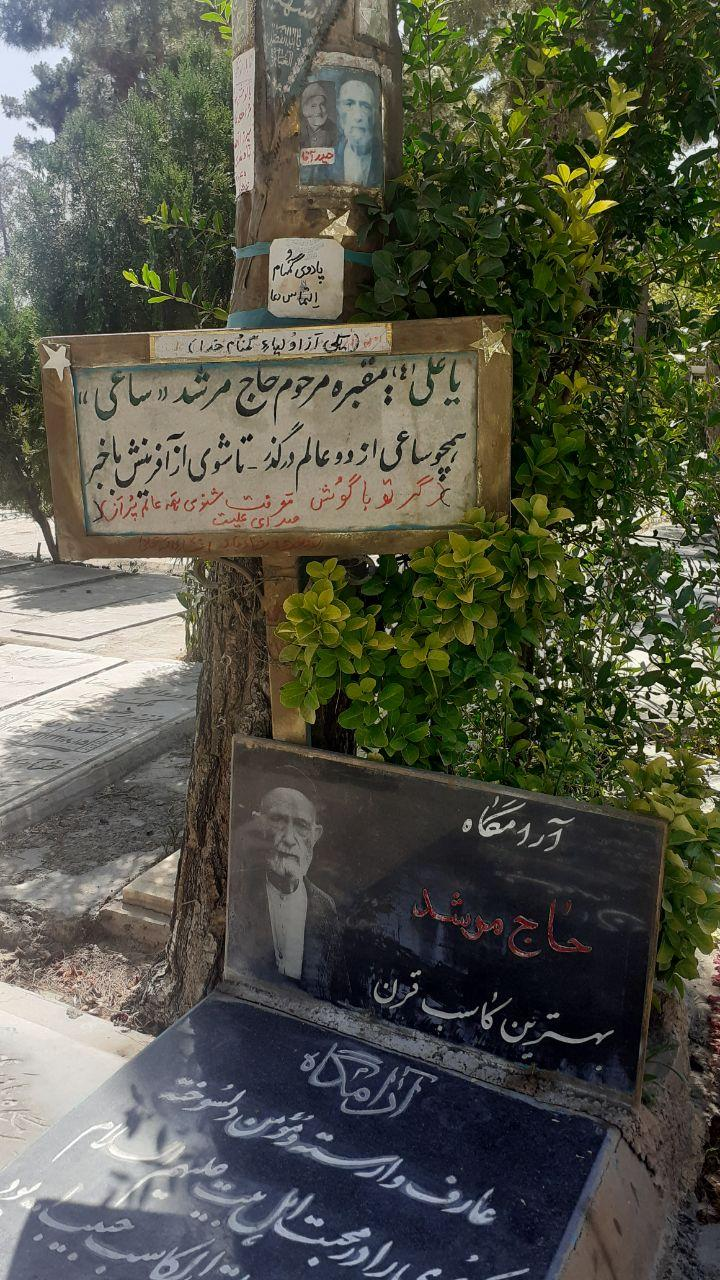 دل نوشته های مریدان مرشد چلویی بالای مزار وی در ابن بابویه شهرری